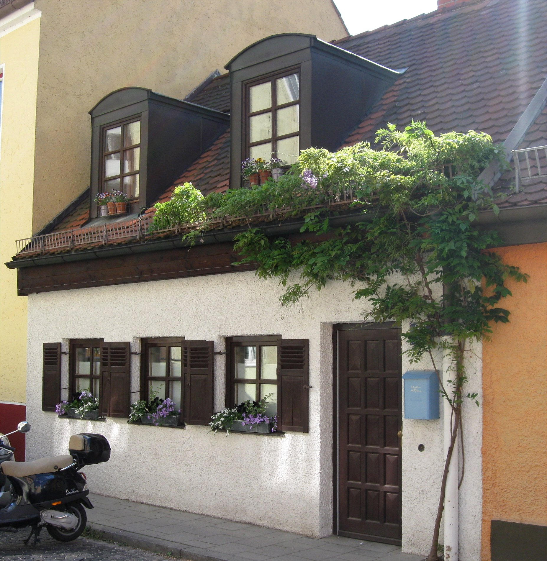 Untere Grasstraße 26; Erdgeschossiges Kleinhaus, um 1840/45; Gruppe mit Nr. 24.